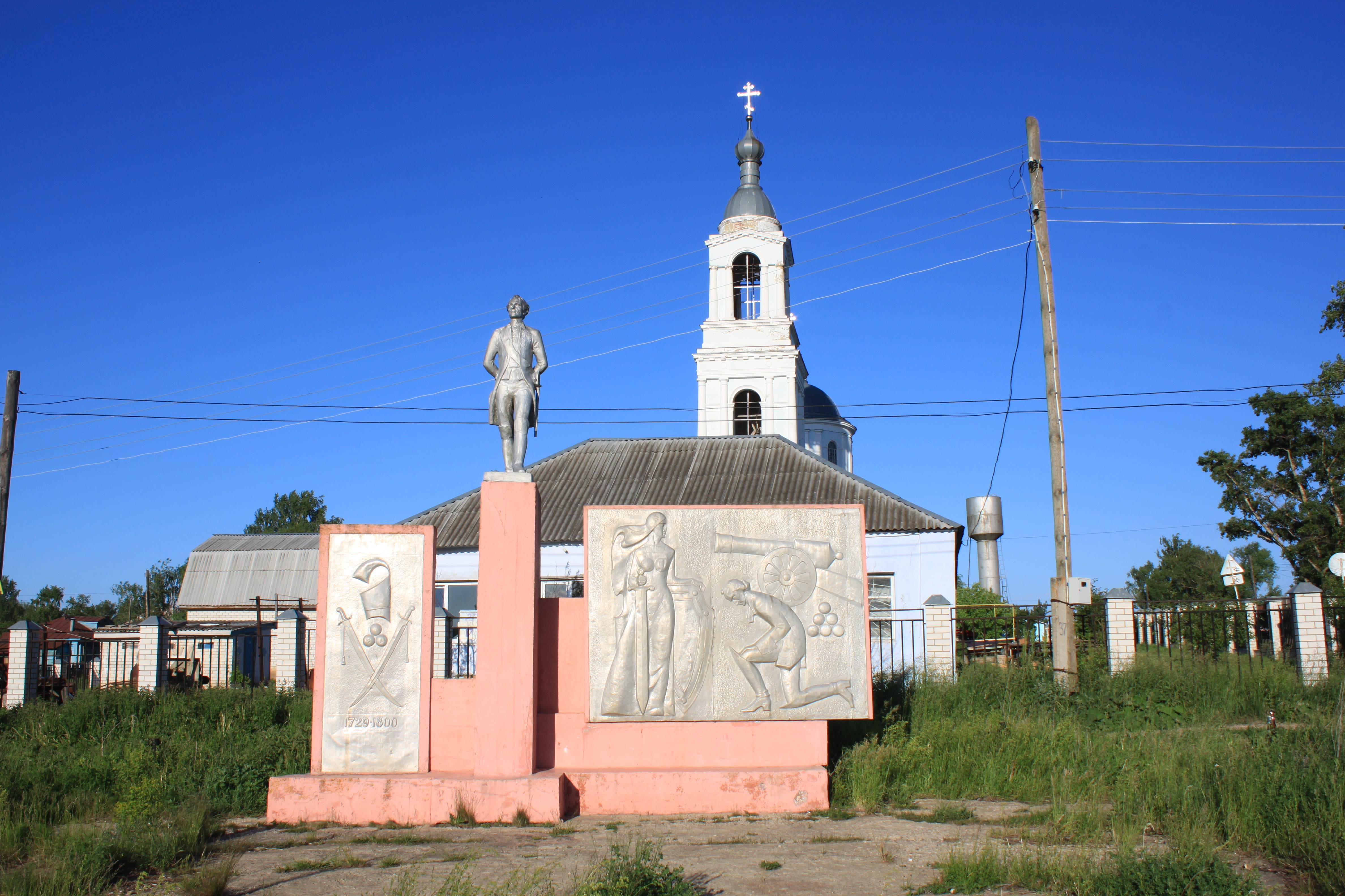 внешний вид